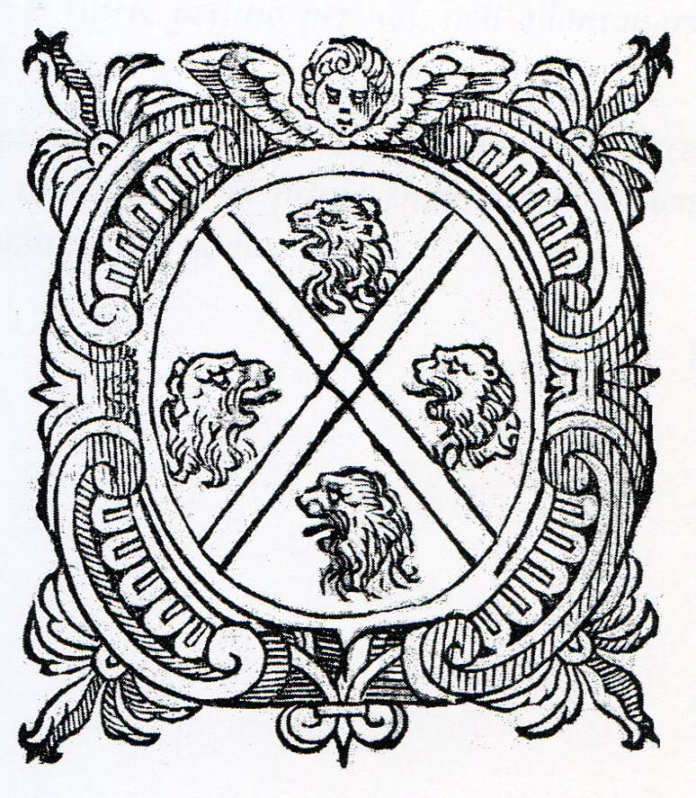 Stemma antico Capasso